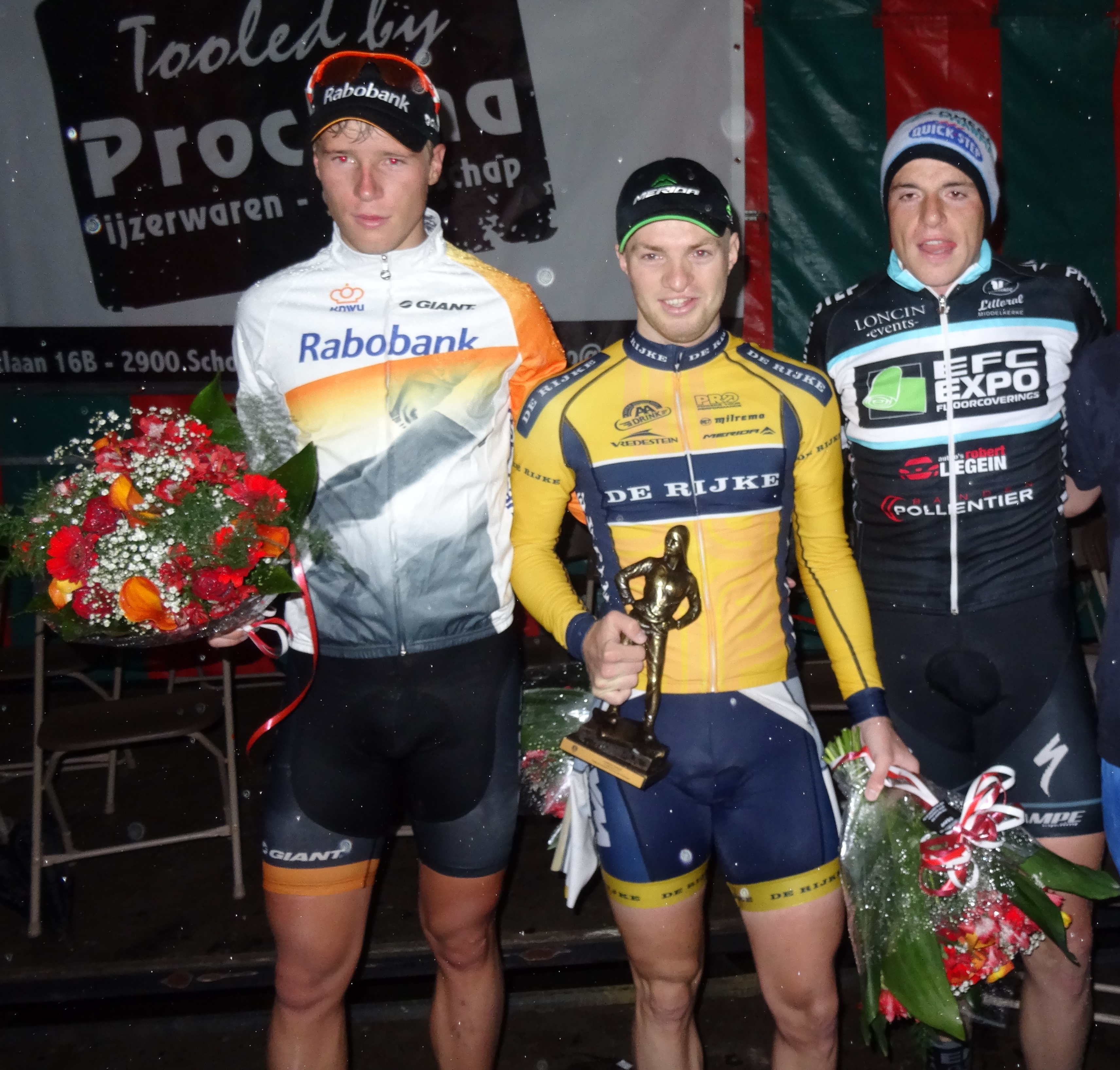 Reportage photographique réalisé le dimanche 10 août à l'occasion du départ et de l'arrivée de la Flèche du port d'Anvers 2014 à Merksem (Anvers), Belgique.